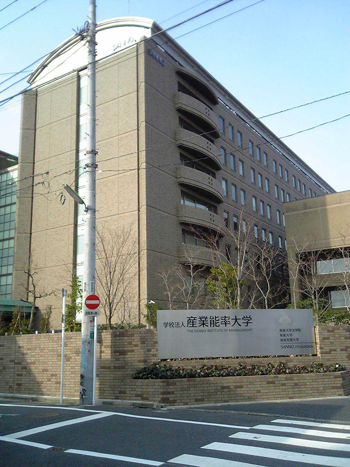 産業能率大学